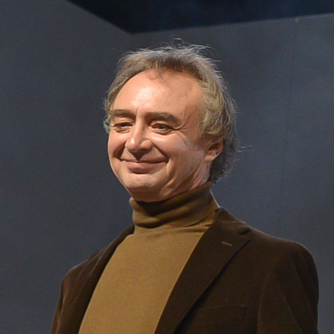 Kung Lear handlar om en makthavare som tappat greppet och hemfaller åt sin fåfänga. Rollen som Kung Lear är Sven Wollters avsked till teatern.